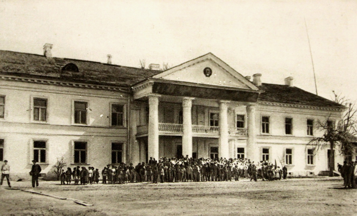 Беларуская (тарашкевіца): Дукора (Dukora), палац Ашторпаў (Aštorp) і Гартынгаў (Harting)